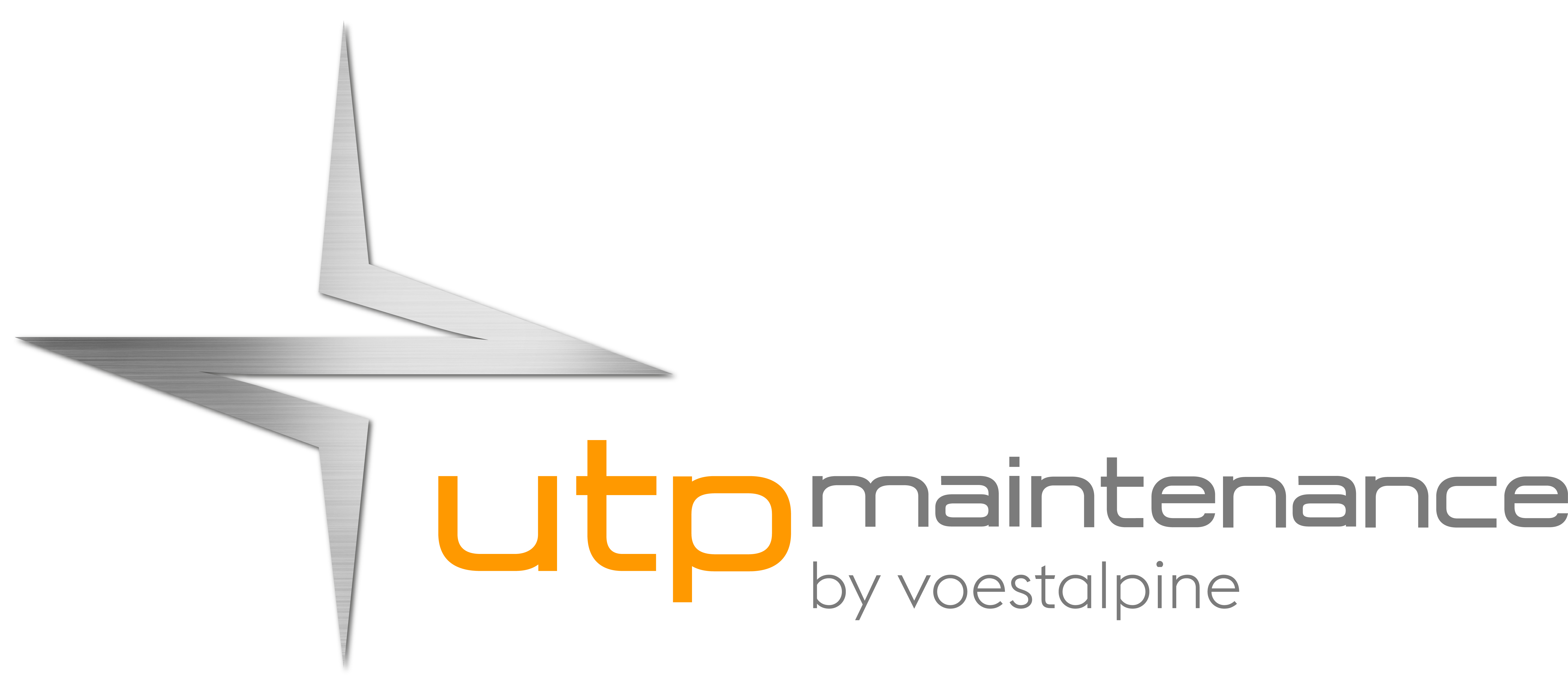 Tailor-Made Protectivity™